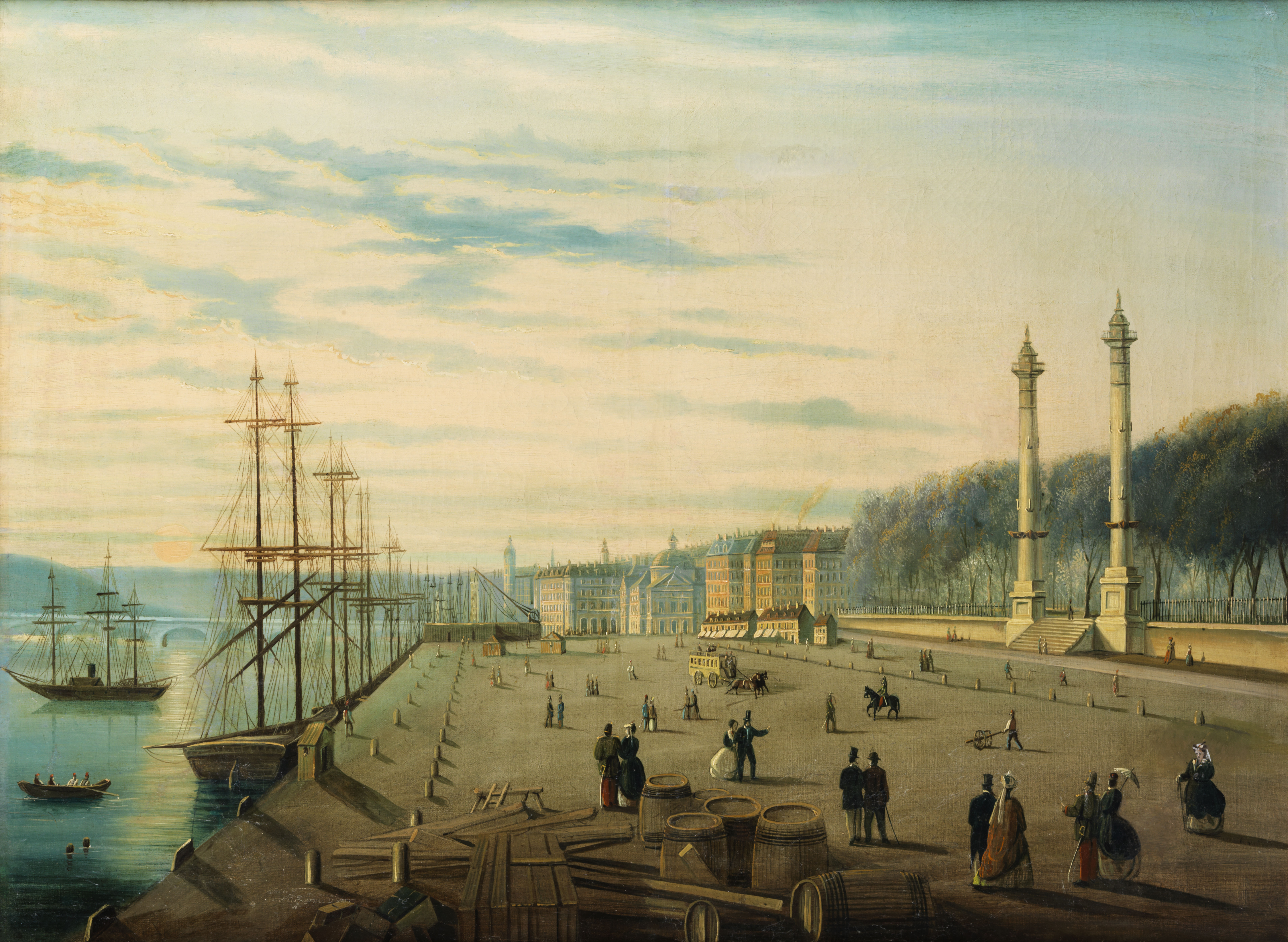 Ansicht von Bordeaux mit Figurenstaffage und Segelschiffen. Öl auf Leinwand. 72 x 98 cm.